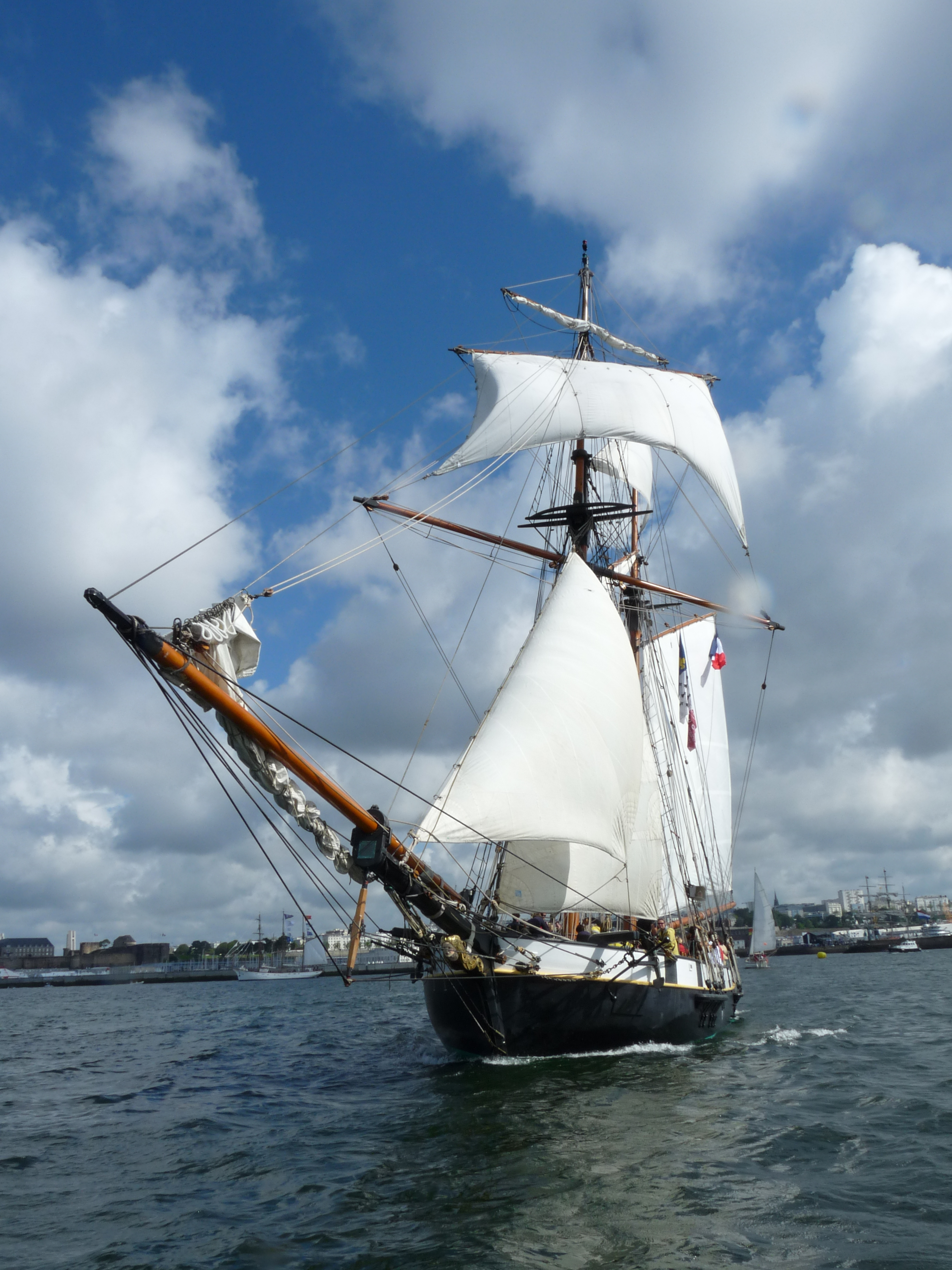 Les Tonnerres de Brest 2012 : La Recouvrance sous voiles à la sortie de la rade abri